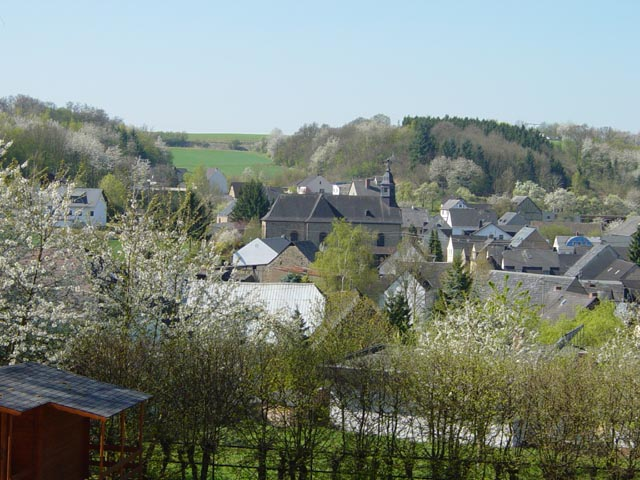 Blick über das Dorf mit Kirche